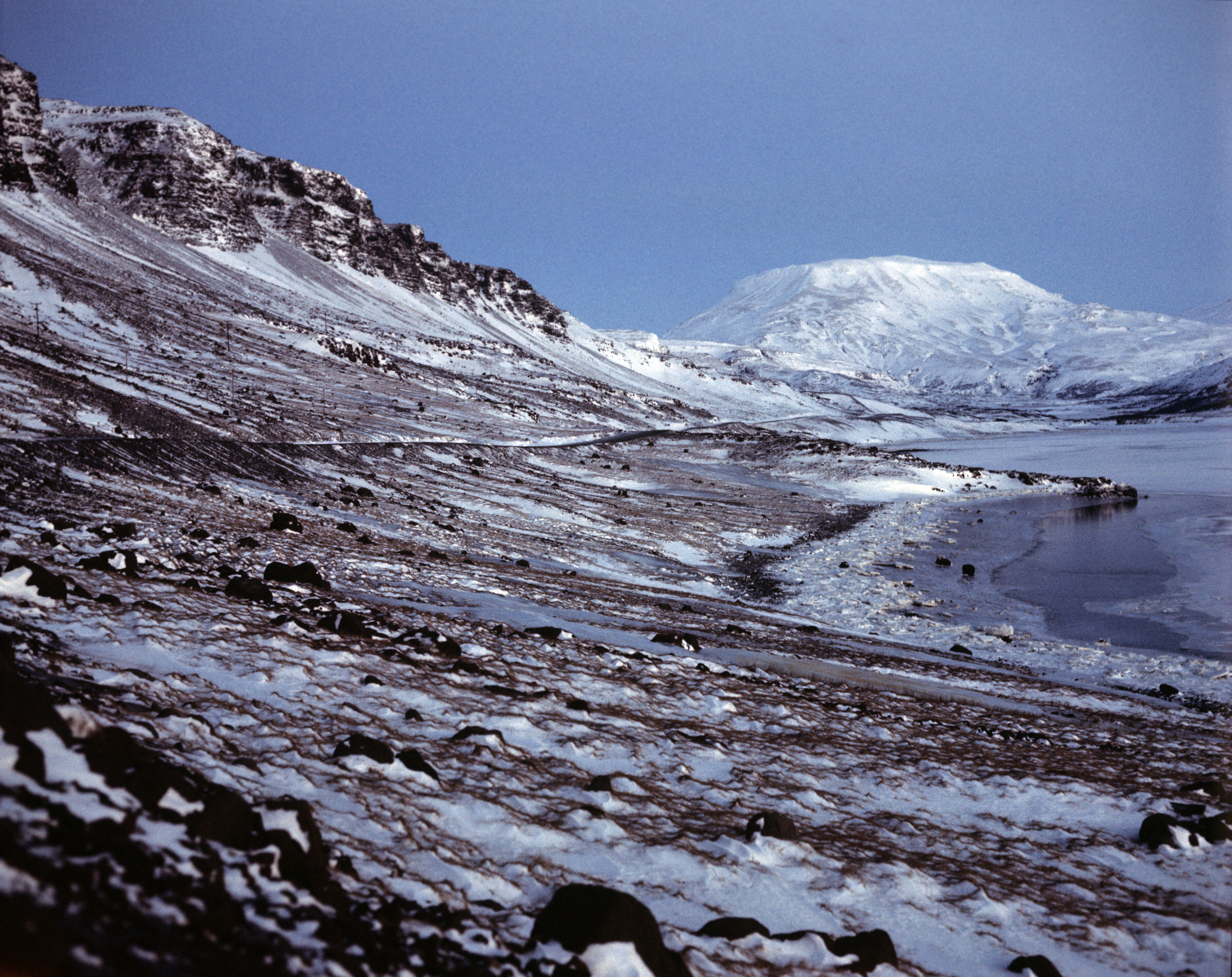 Das Ende des Hvalfjörður im Winter; hinten Múlafjall.